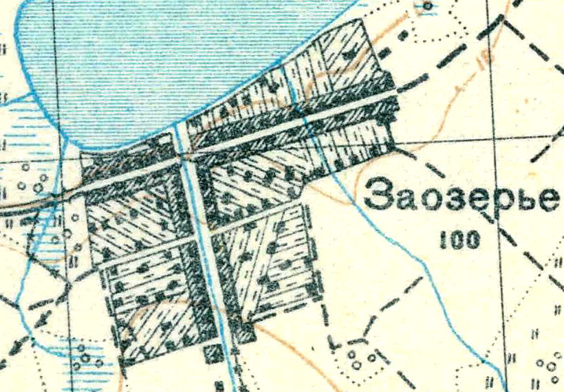 Топографическая карта Ленинградской области, квадрат О-36-25-А-в (Пос. Дивенский), деревня Заозерье